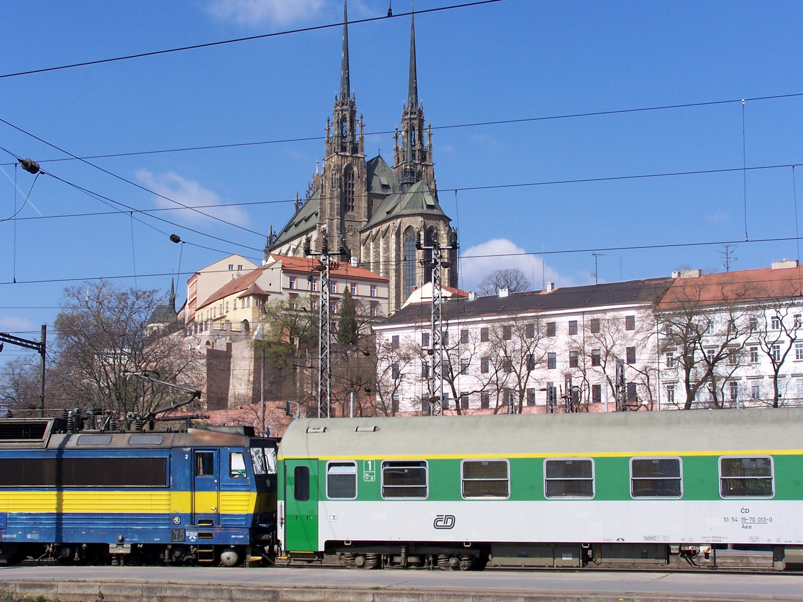 Brno